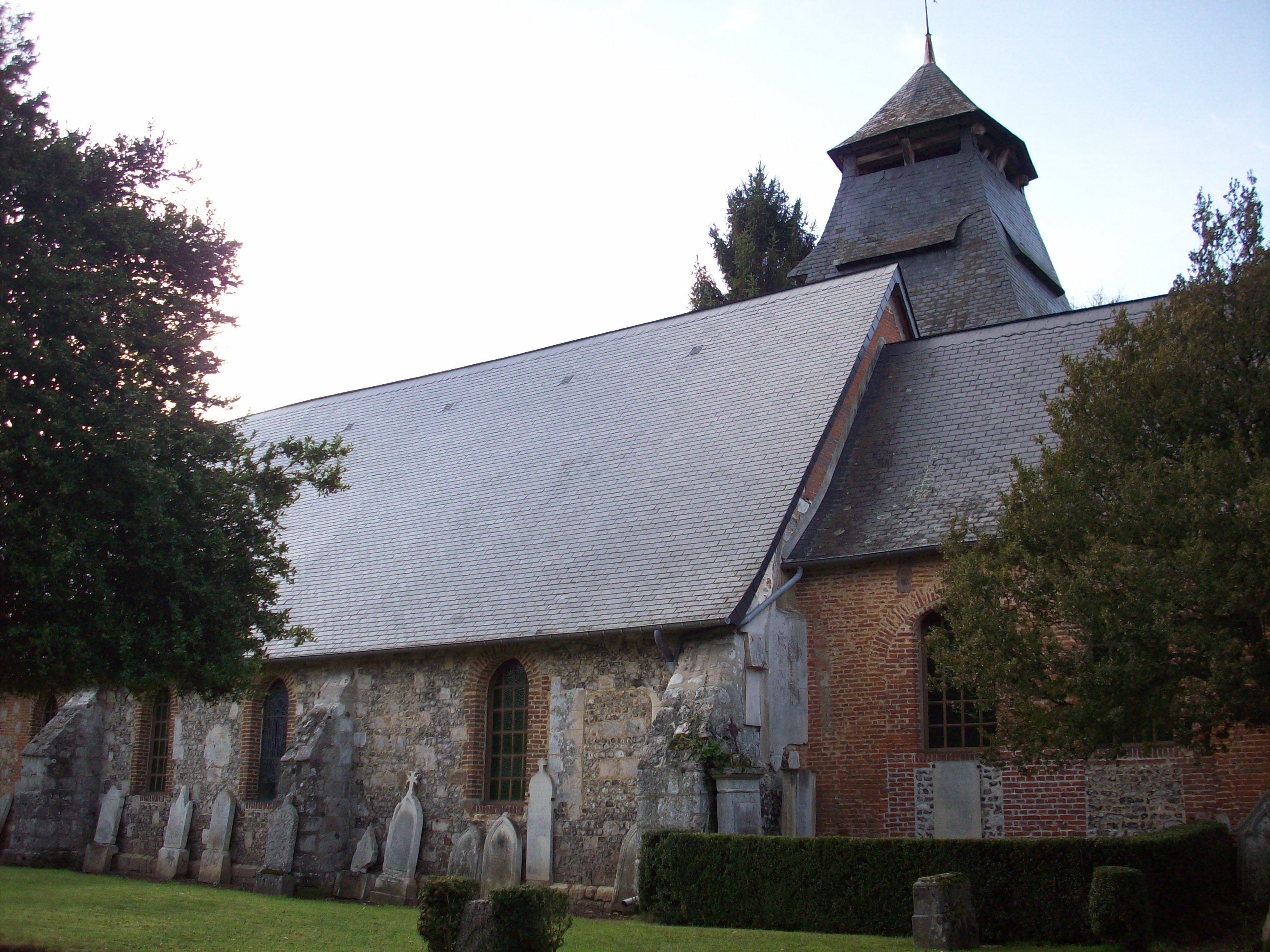 Eglise Notre-Dame de Rosay-sur-Lieure.